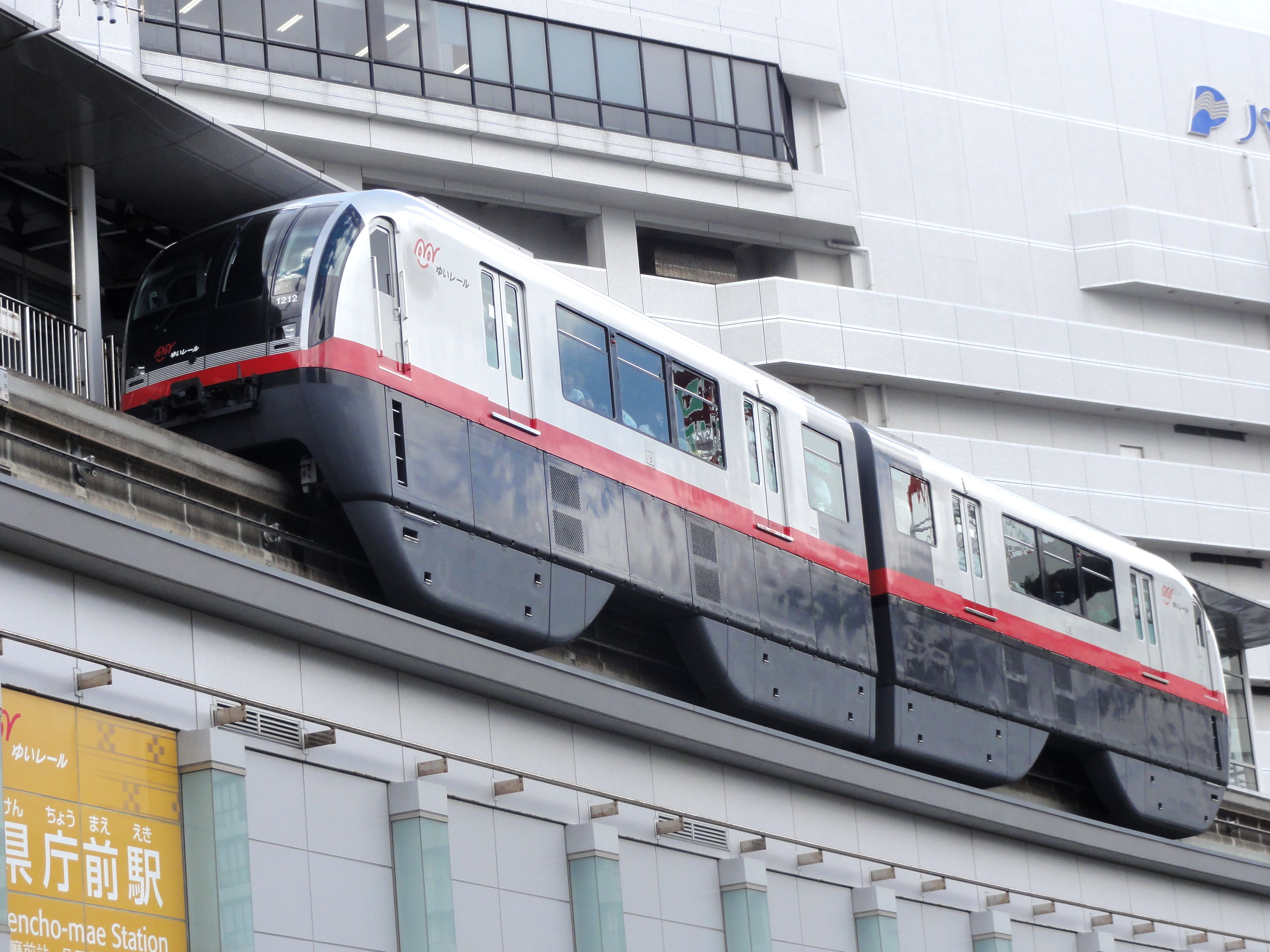 沖縄都市モノレール1000形電車1212+1112の1編成。県庁前駅にて。